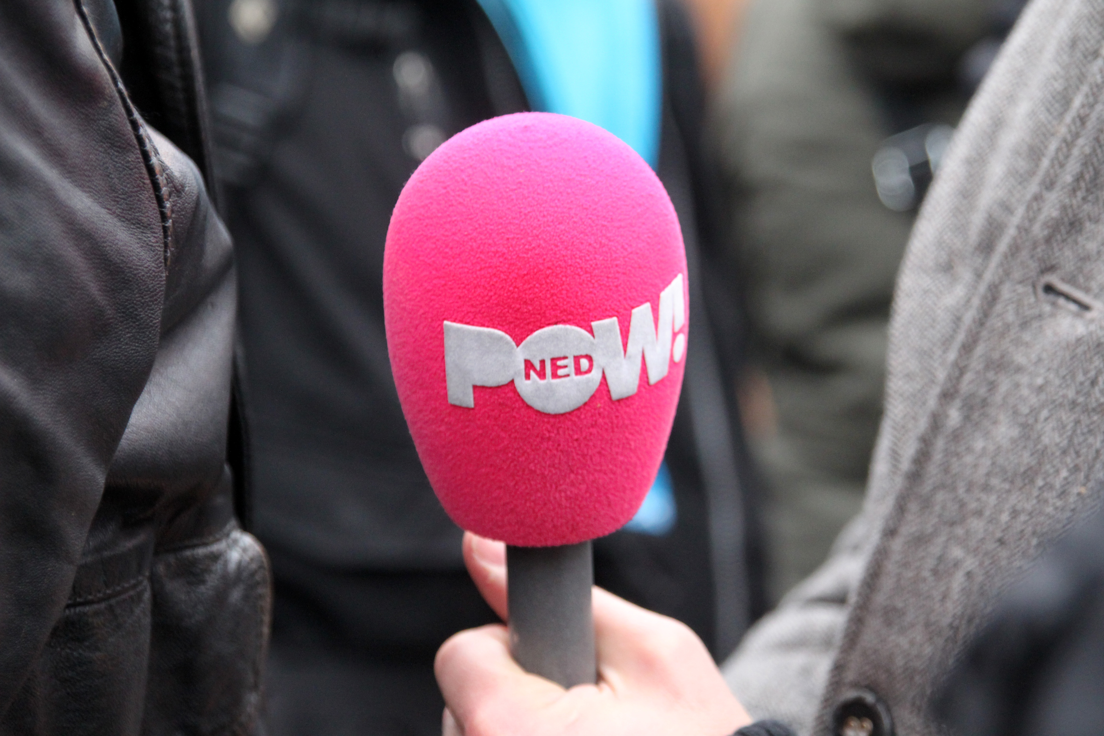 Microfoon voor het programma PowNews van de publieke omroep PowNed.